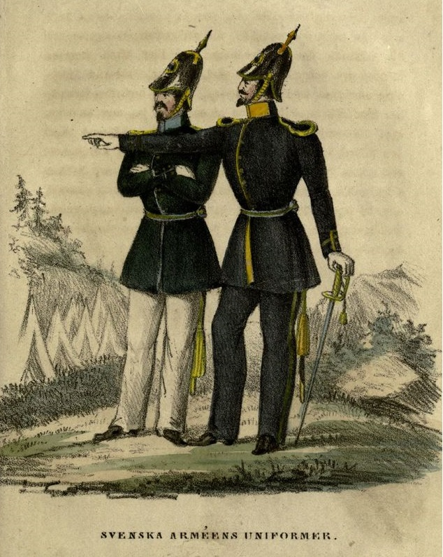 Litografi ur Svea-folkkalendern 1846. Uniform m/1845